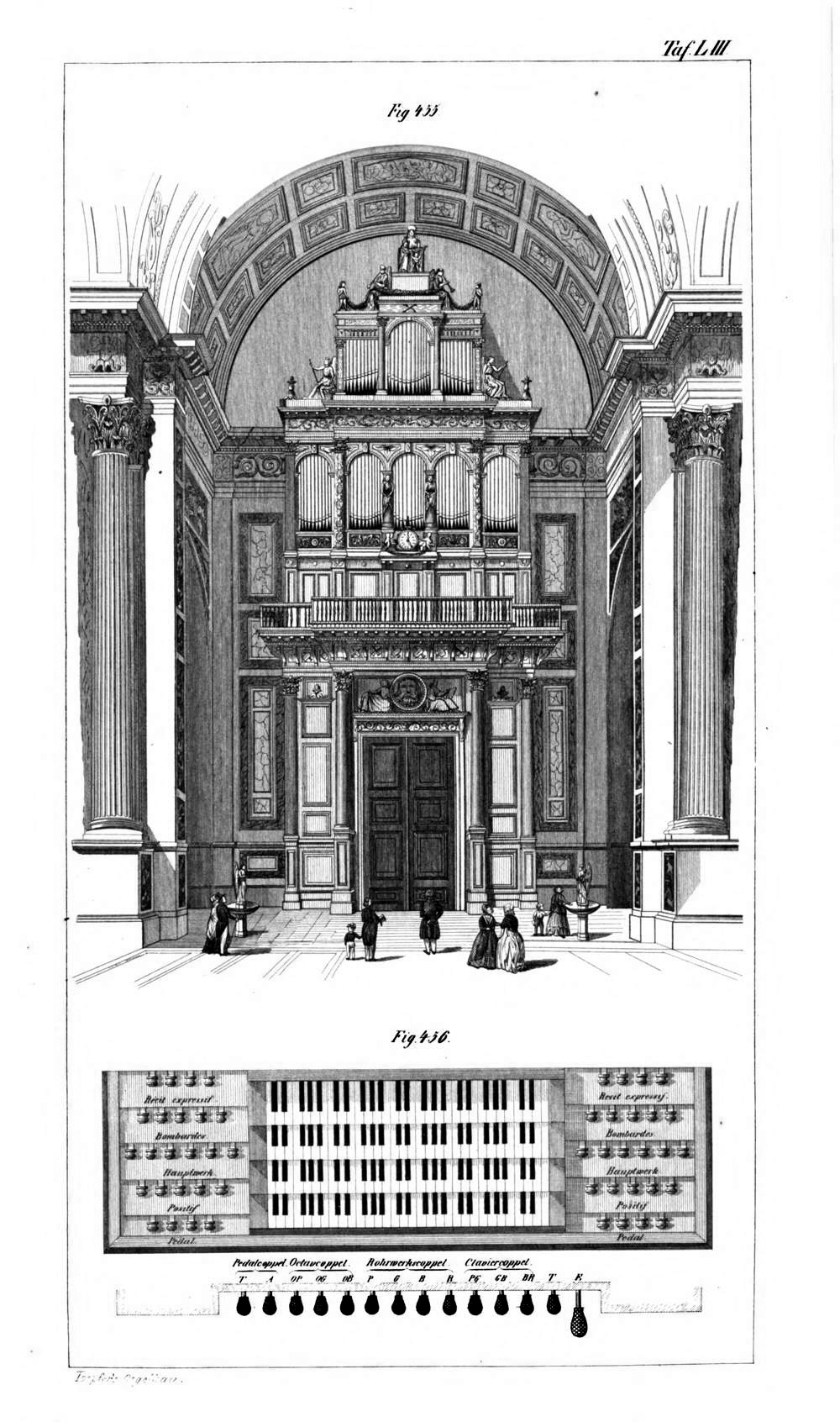 Tafel aus Johann Gottlob Töpfer: Atlas zum Lehrbuch der Orgelbaukunst, Weimar 1855Tafel 53